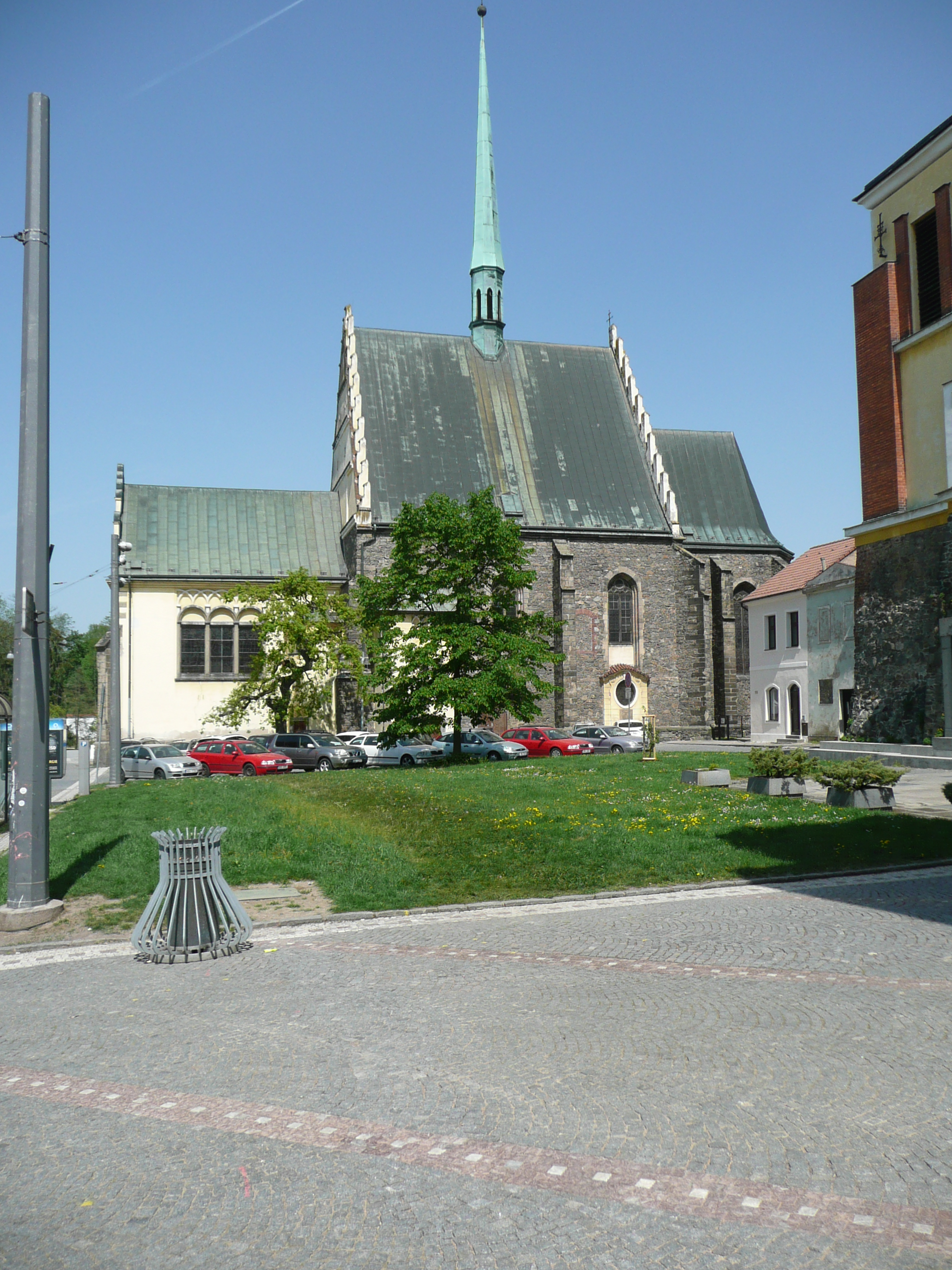 St.-Bartholomäuskirche in Pardubice